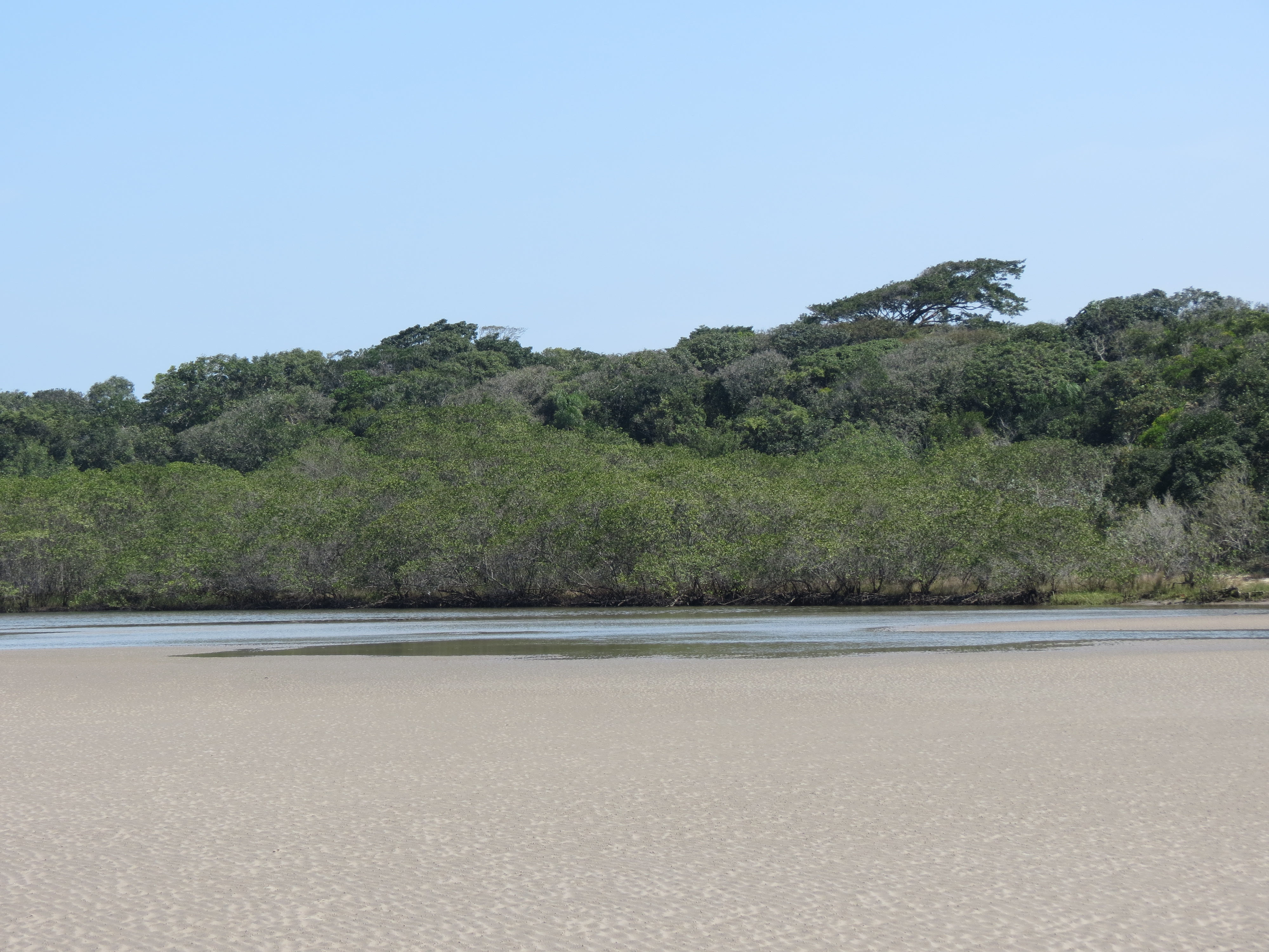 Praia de Itaguaré e Parque Estadual das Restingas de Bertioga.